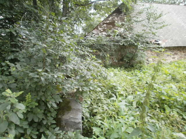 Elutornist läänes asuva ringmüüri lõik.